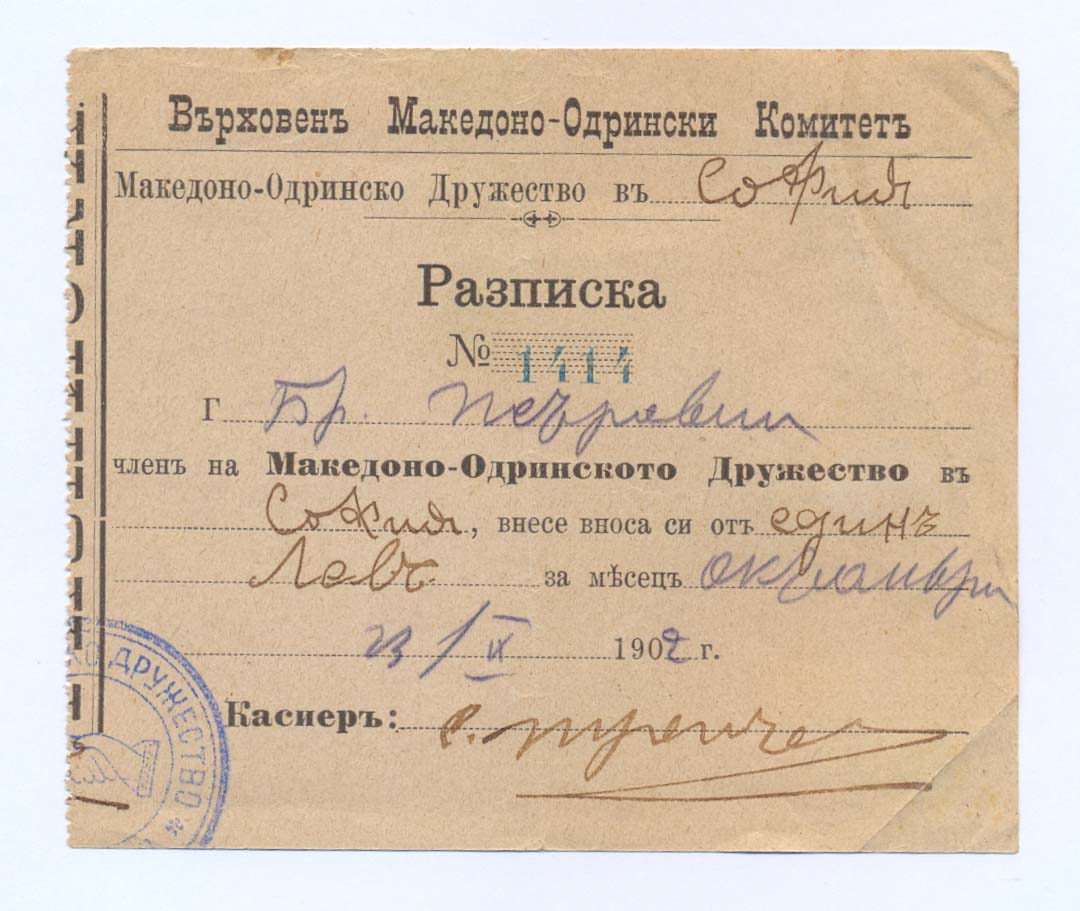 Документ за членски внос на ВМОК.